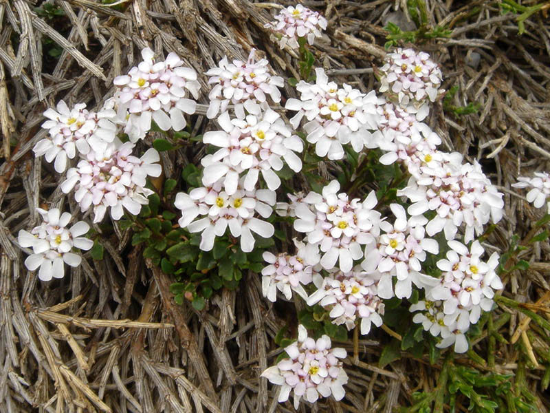 Iberis carnosa Willd. Photographié dans les Picos de Europa.